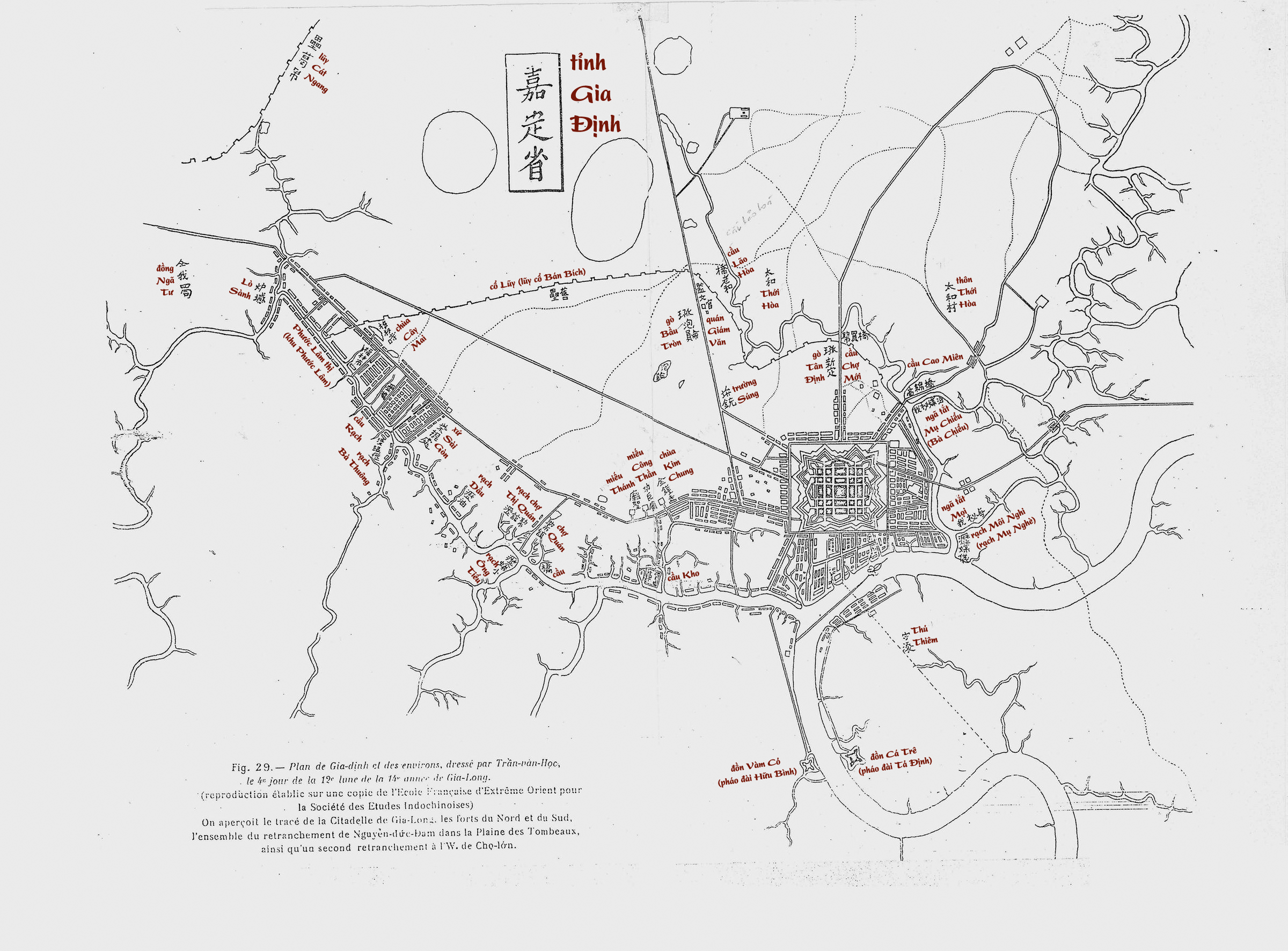 Bức bản đồ việt hóa Gia Định năm 1815 do Trần Văn Học vẽ. Bức bản đồ này được gọi là v2 (tức version 2) vì v1 là bức bản đồ việt hóa quen thuộc của giáo sư Nguyễn Đình Đầu ( Bức bản đồ v2 này chỉ dịch các địa danh trong bản đồ gốc Trần Văn Học và không vẽ hoặc dịch thêm (chỉ thêm phần Đồn Cá Tra / Đồn Vàm Cỏ) như bản đồ v1 của giáo sư Nguyễn Đình Đầu. Ngoài ra, bức bản đồ v2 này cũng chỉnh sửa nhiều lỗi dịch sai, dịch thiếu trong bản v1 của giáo sư Nguyễn Đình Đầu